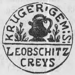 Altes Siegel bzw. Stempel der Gemeinde Krug im Kreis Leobschütz.